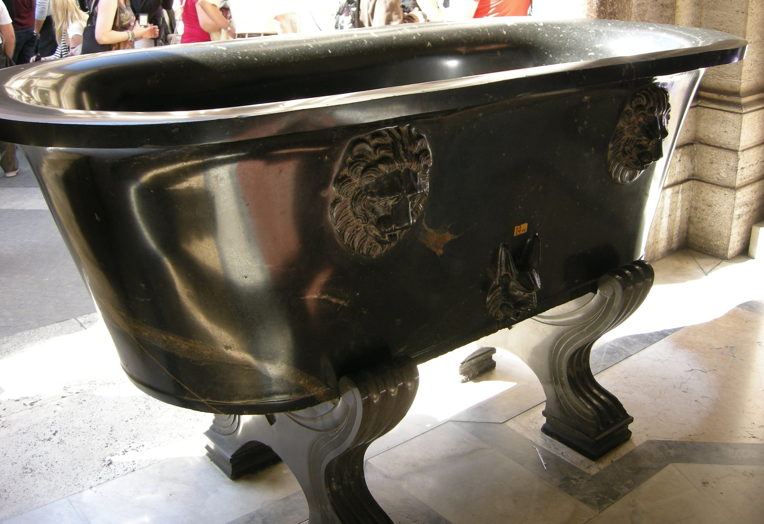 Vasca in granito nero di Assuan, dalle Terme di Caracalla. Museo Pio-Clementino - Cortile ottagono, inv. 1007